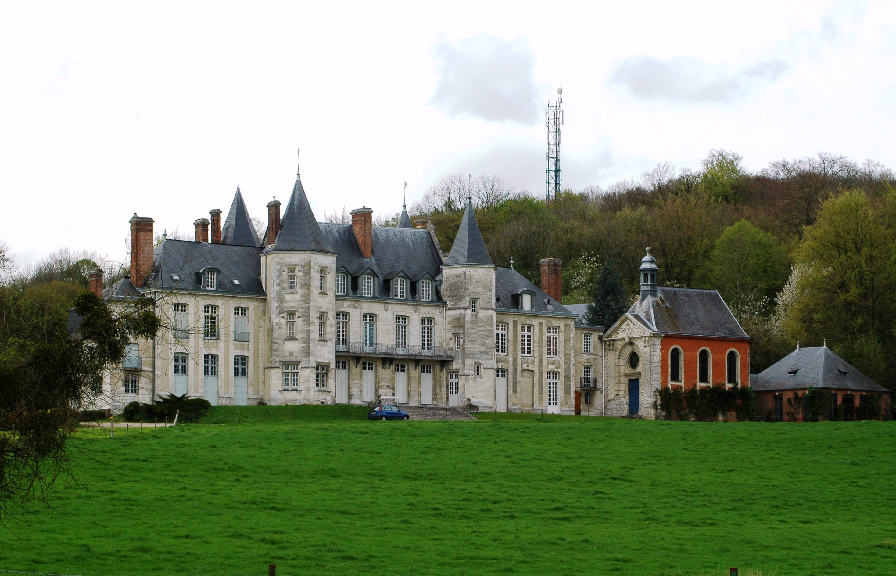 Château d'Esneval in Pavilly, Seine-Maritime Haute-Normandie, France